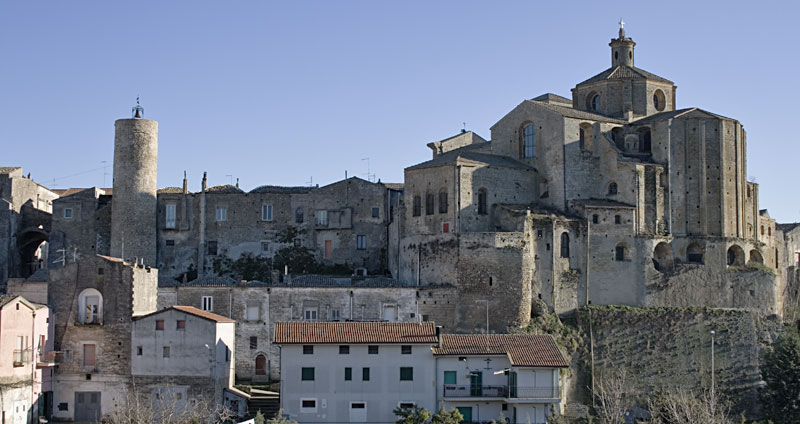 Concattedrale di Santa Maria Assunta (Irsina)